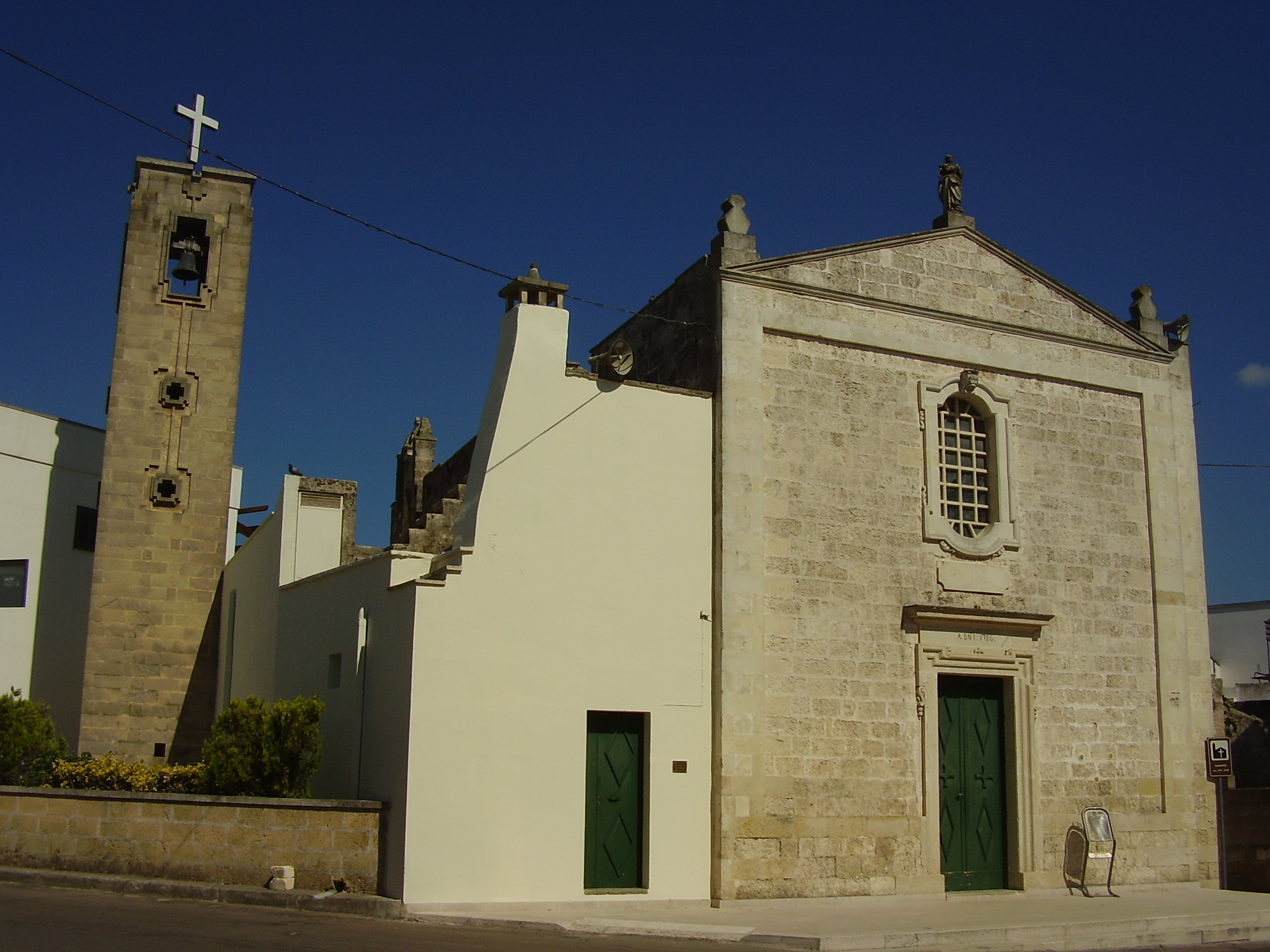 Chiesa Madonna Assunta Botrugno